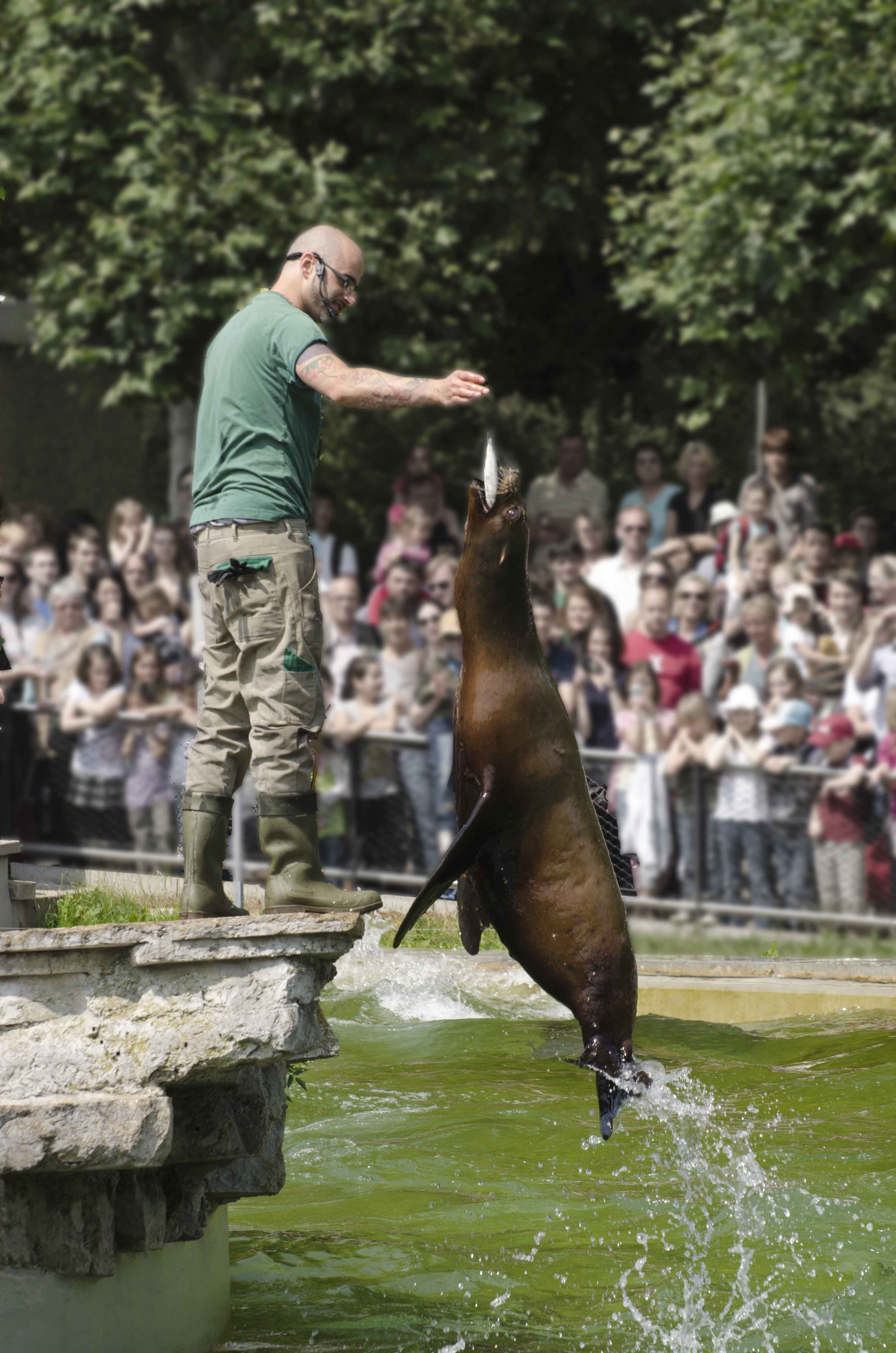 Seelöwenfütterung, Wilhelma Stuttgart